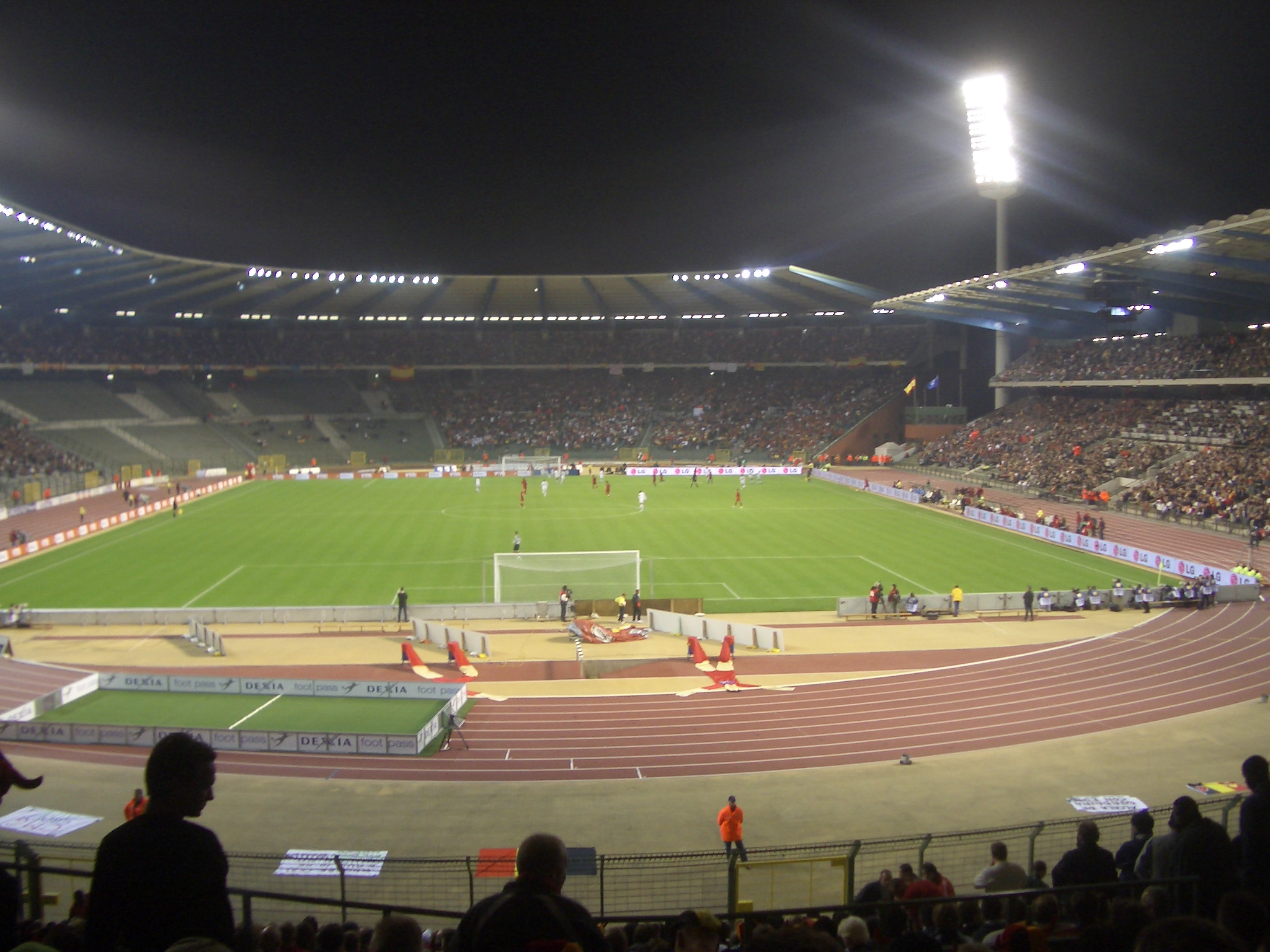 Le Stade Roi-Baudouin lors de Belgique-Espagne le 8 octobre 2005